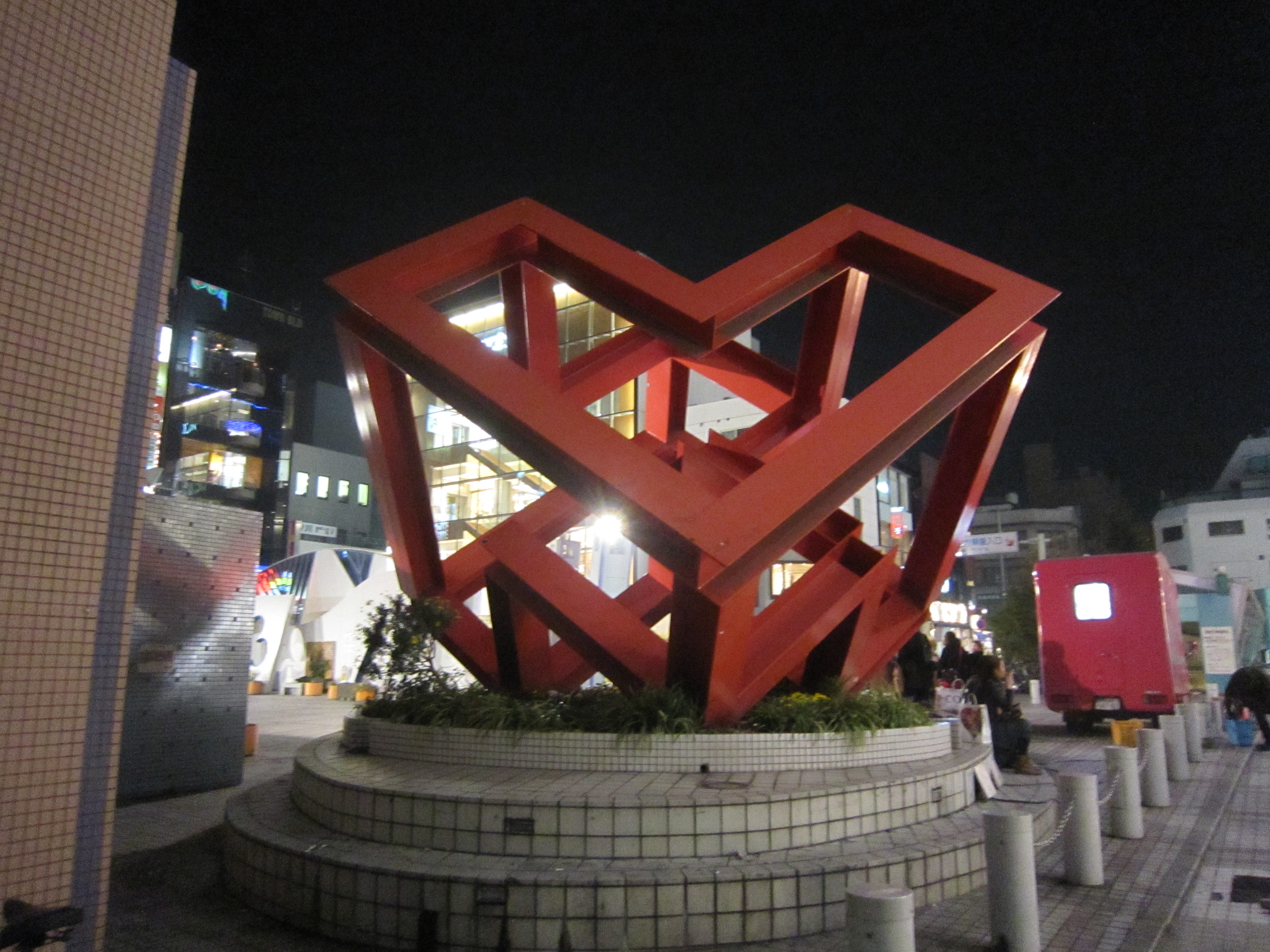 アリスガーデンの中では一番大きなオブジェ。